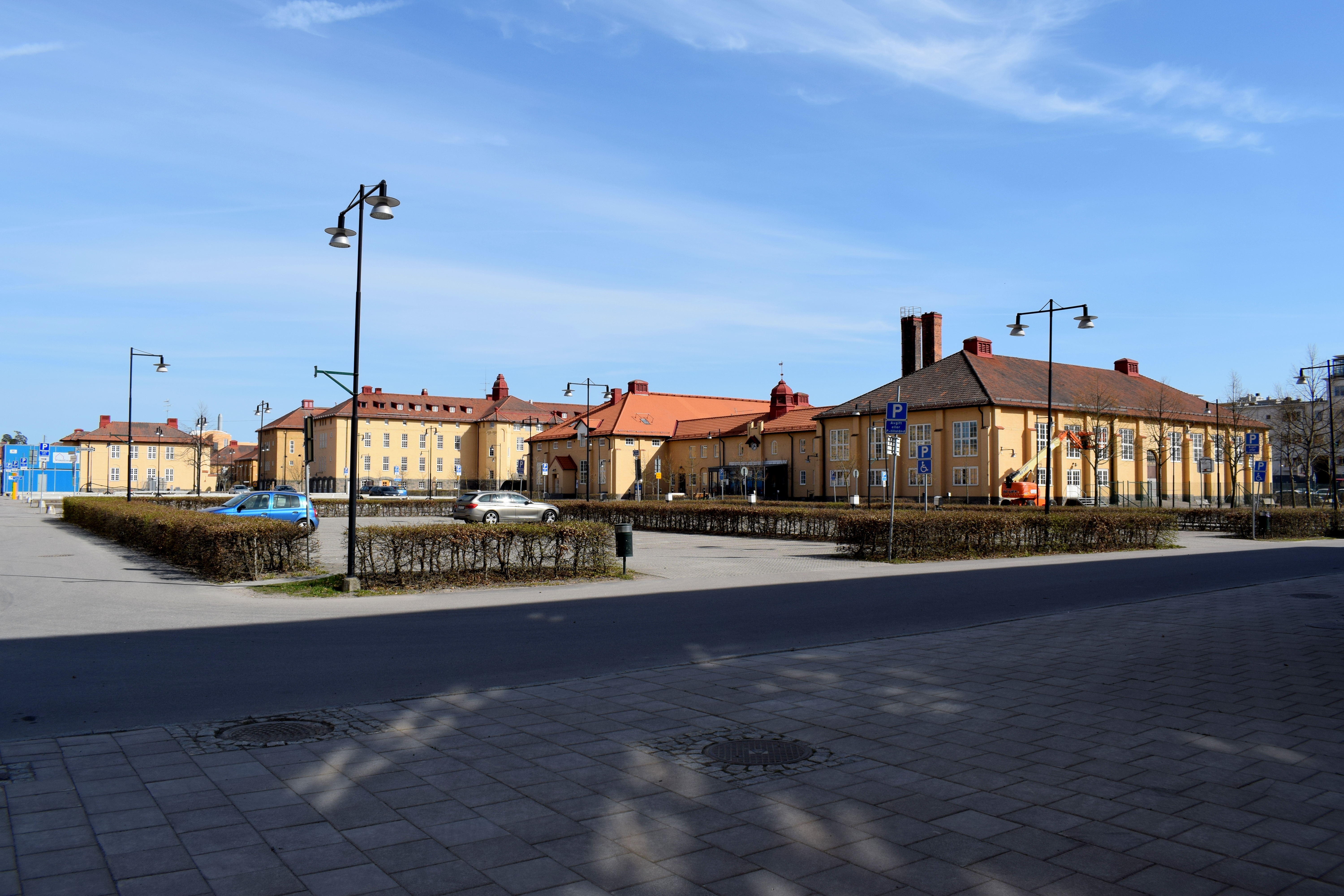 Före detta matsalsbyggnad vid västra delen av dubbelkasernetablissementet i Linköping. Matsalsbyggnaden uppfördes ursprungligen för Andra livgrenadjärregementet.